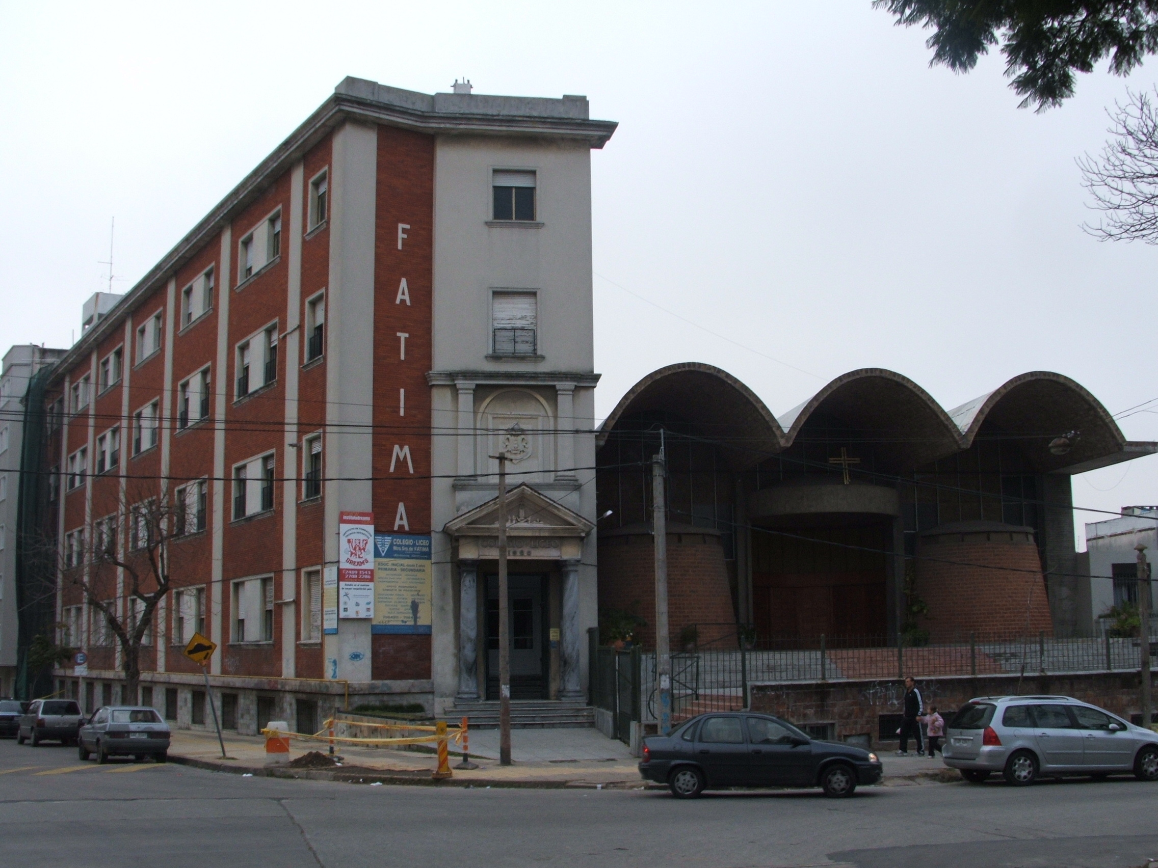 Colegio y Liceo Nuestra Señora de Fátima, Gral. Brito del Pino 1344, Pocitos, Montevideo. Al lado, la Parroquia Nuestra Señora de Fátima. Padres Claretianos.